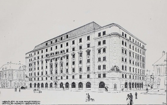 Bethlen-udvar (Attila körúti bérház), távlati kép, terv. Gyenes Lajos és Dr. Neuschloss Kornél